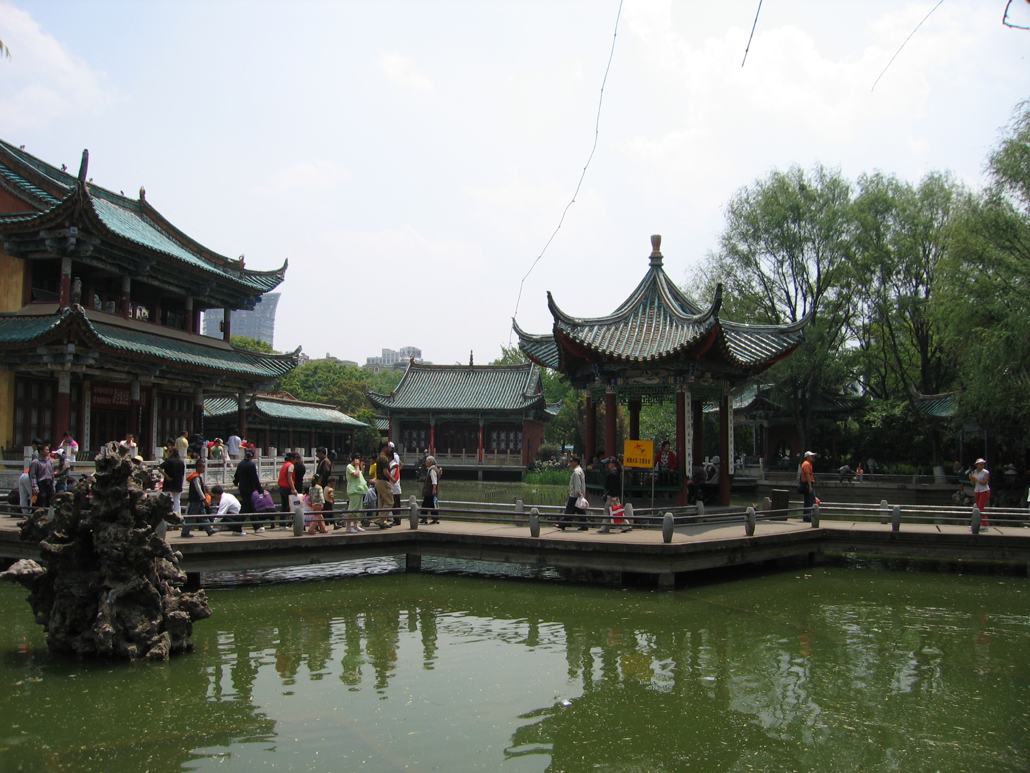 Green Lake Park (Cuihu Park) in Kunming, Yunnan Province.